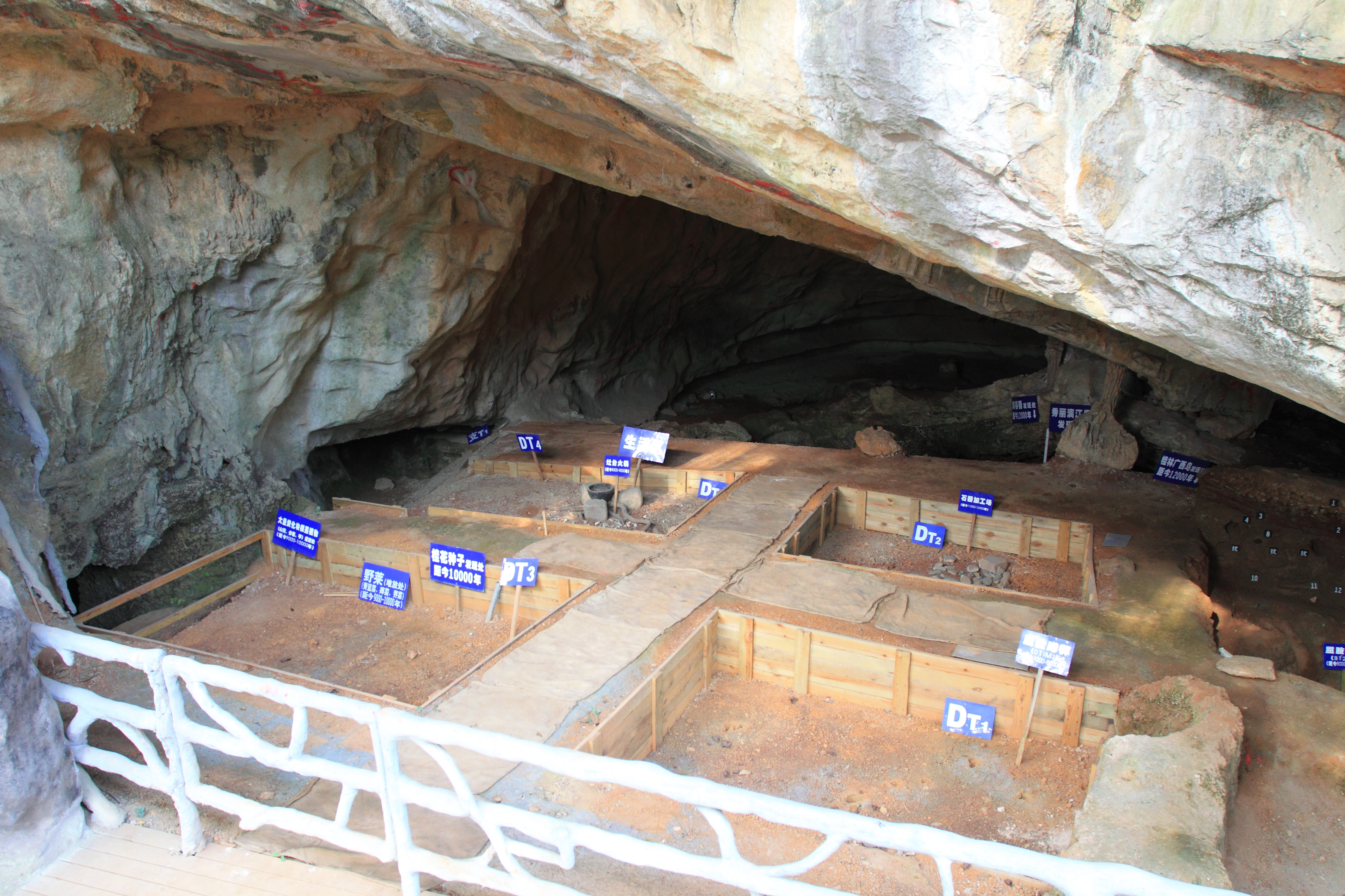 甑皮岩遗址